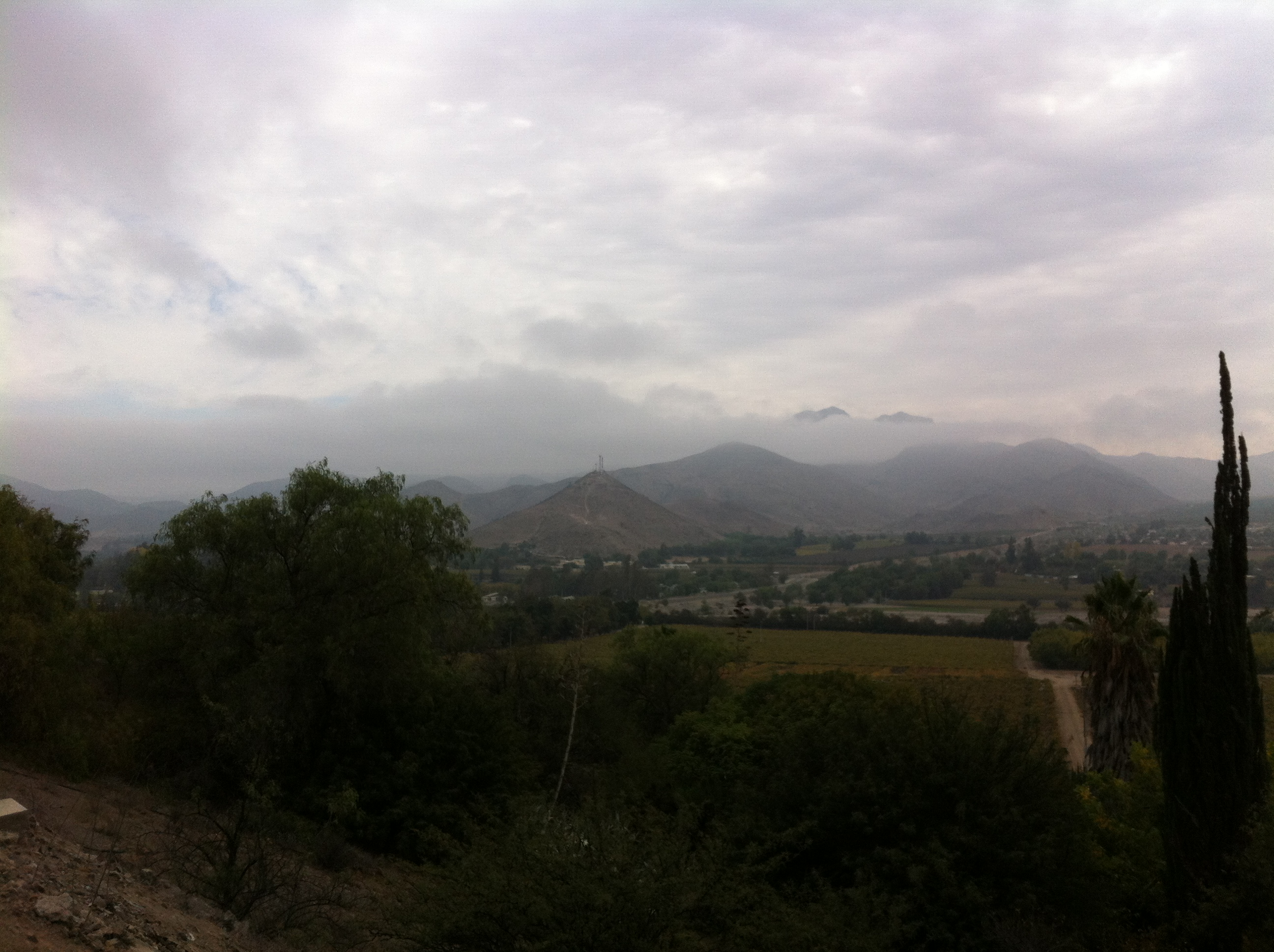 Vista de los campos de Vicuña, alrededor de la ciudad.